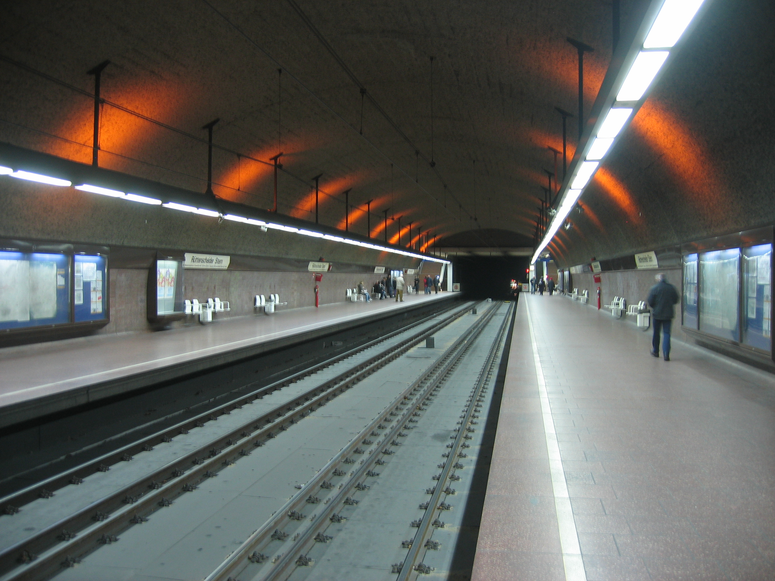 U-Bahnhof Rüttenscheider Stern der Stadtbahn Essen